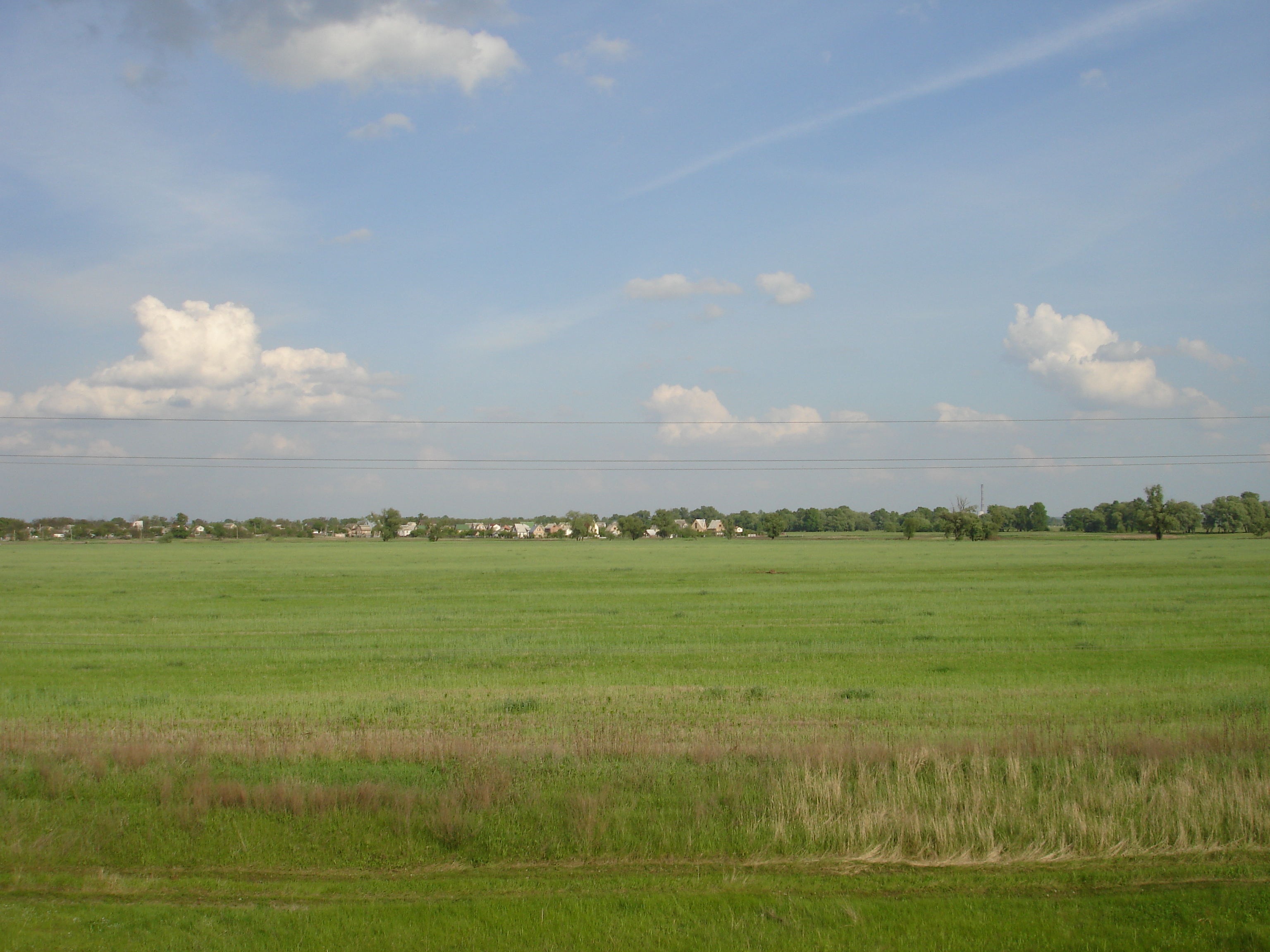 Село Хотянівка: Знімок села Хотянівки здалеку